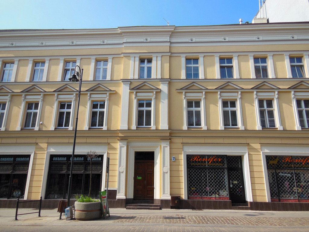 Kamienica przy ul. Dworcowej 7 w Bydgoszczy